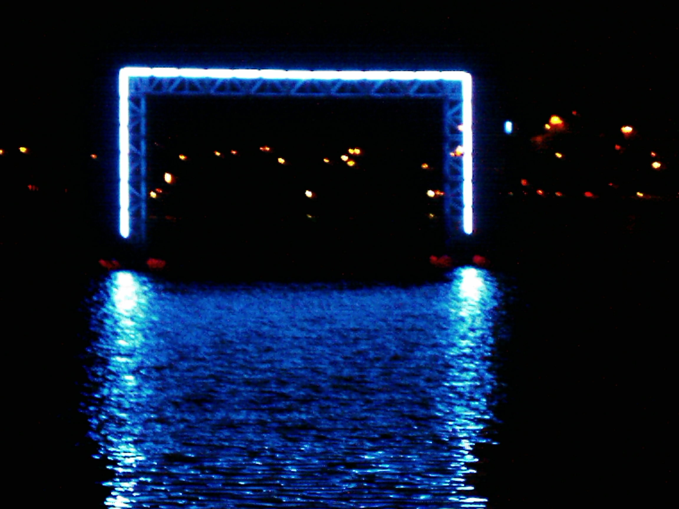 Blue Goal, Binnenalster Hamburg